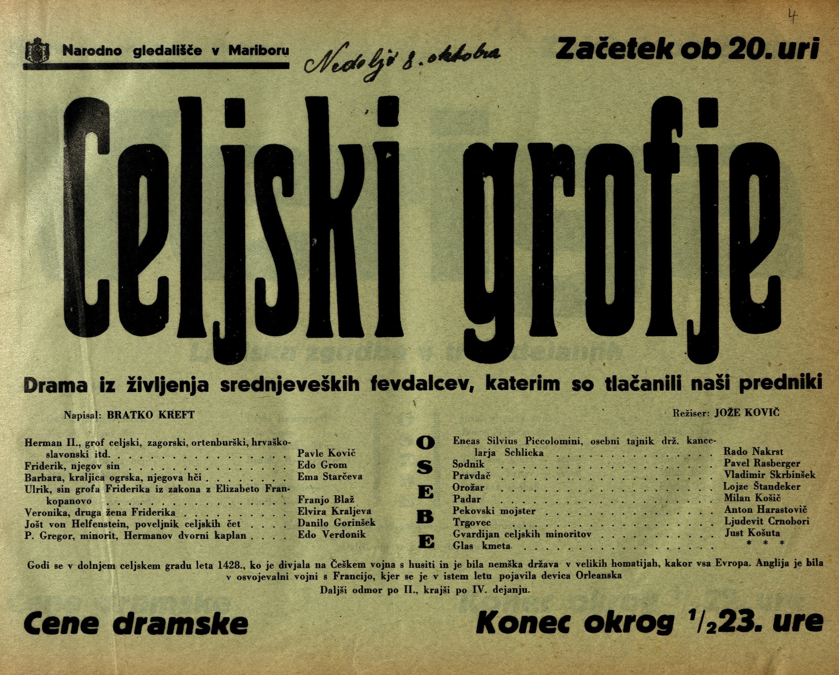 Plakat za predstavo Celjski grofje v Narodnem gledališču v Mariboru.